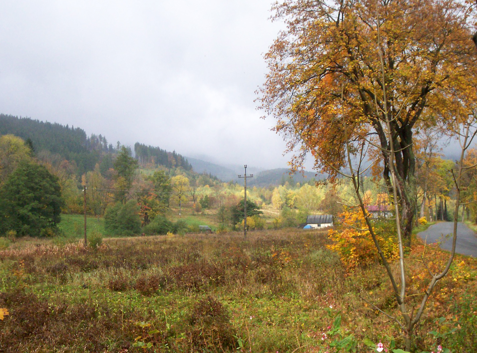 Polska. Powiat Kamienna Góra, wieś Jarkowice.